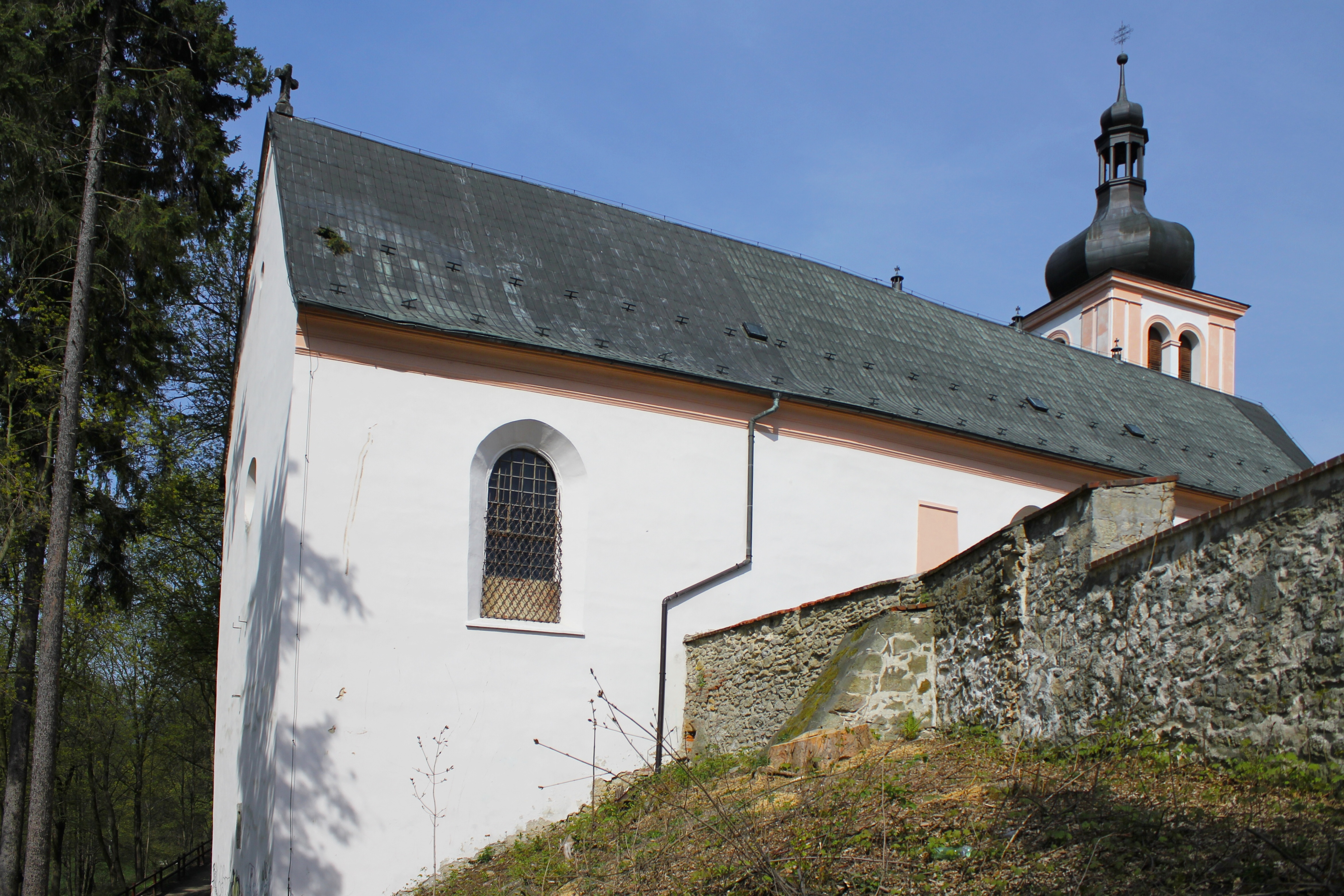 Kostel Seslání Ducha Svatého